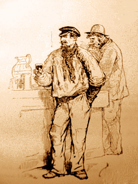 Ouvriers buvant du vin à l'heure vers 1907